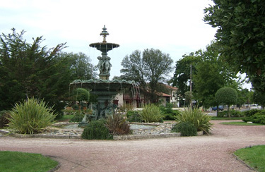 Fontaine de Tourny à Soulac-sur-Mer, Gironde, France